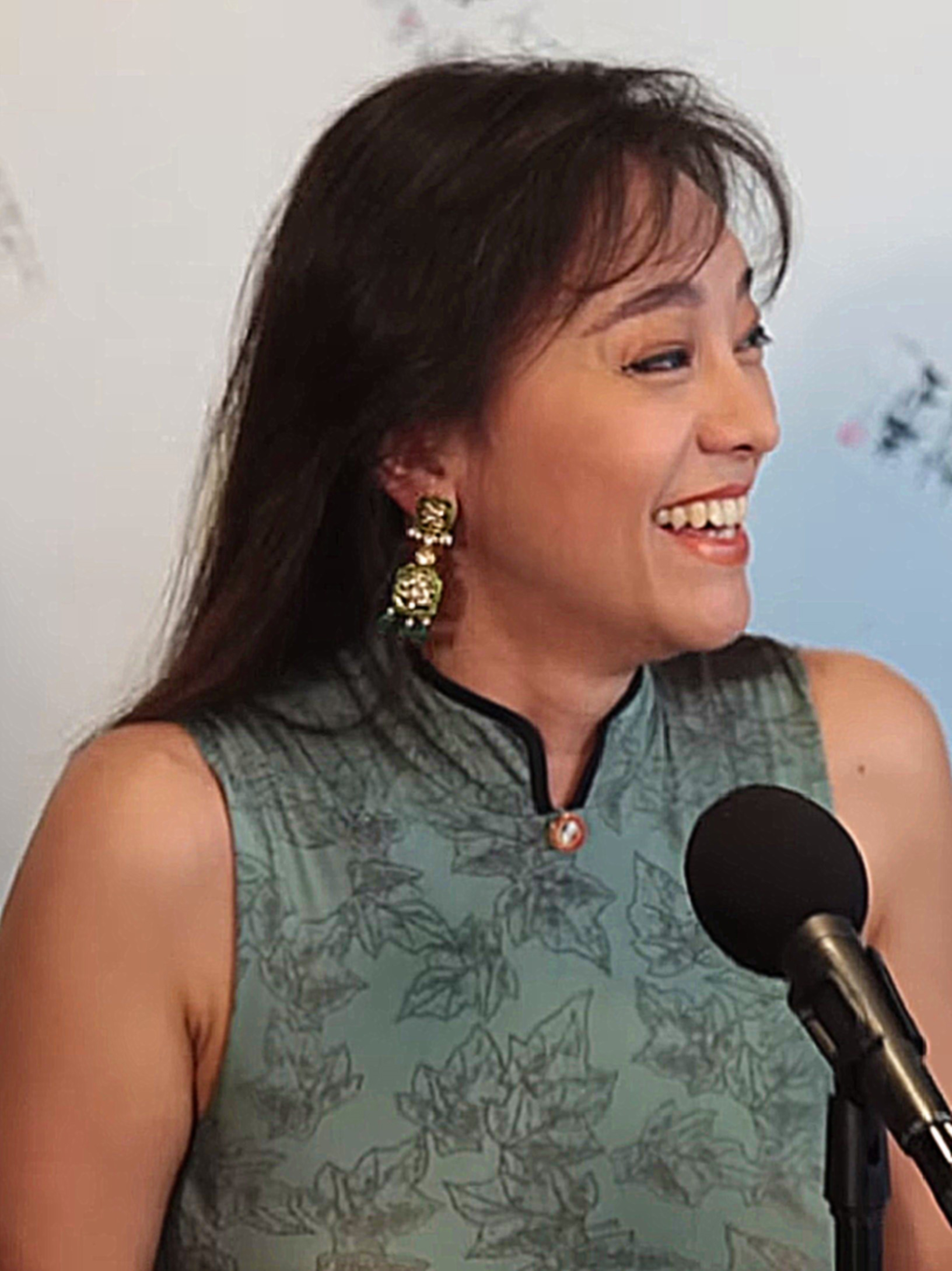 中文（香港）: 前香港女藝人，1988年至1996年曾參與多部電影，1997年淡出演藝圈後，主要擔任健康快車、協青社、願望成真基金及防止兒童性侵犯協會等慈善團體的大使